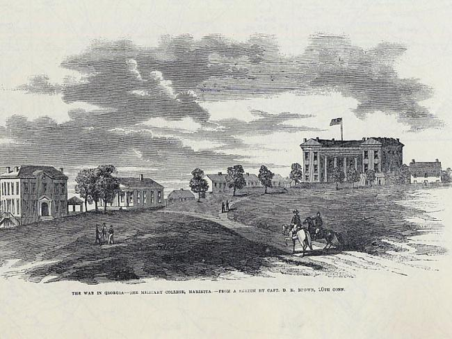 佐治亚军事学院，创建于1851年